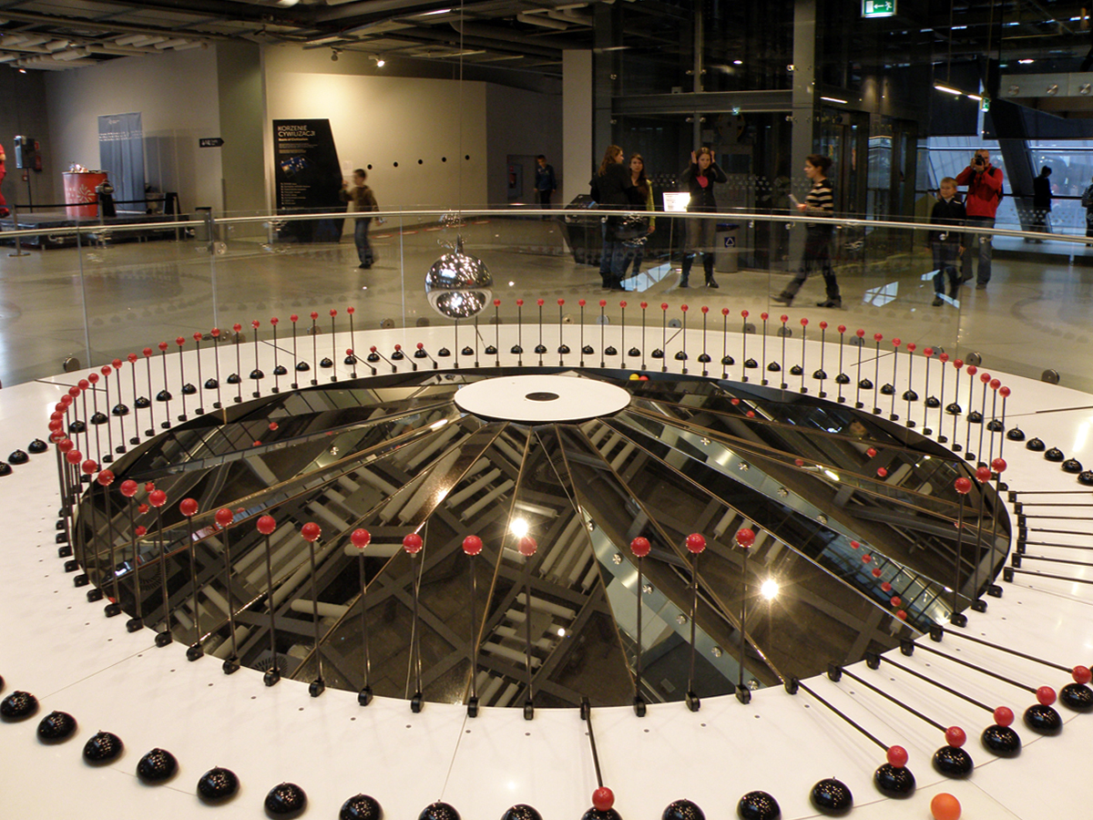 Warszawa - Centrum Nauki Kopernik - wahadło Foucaulta